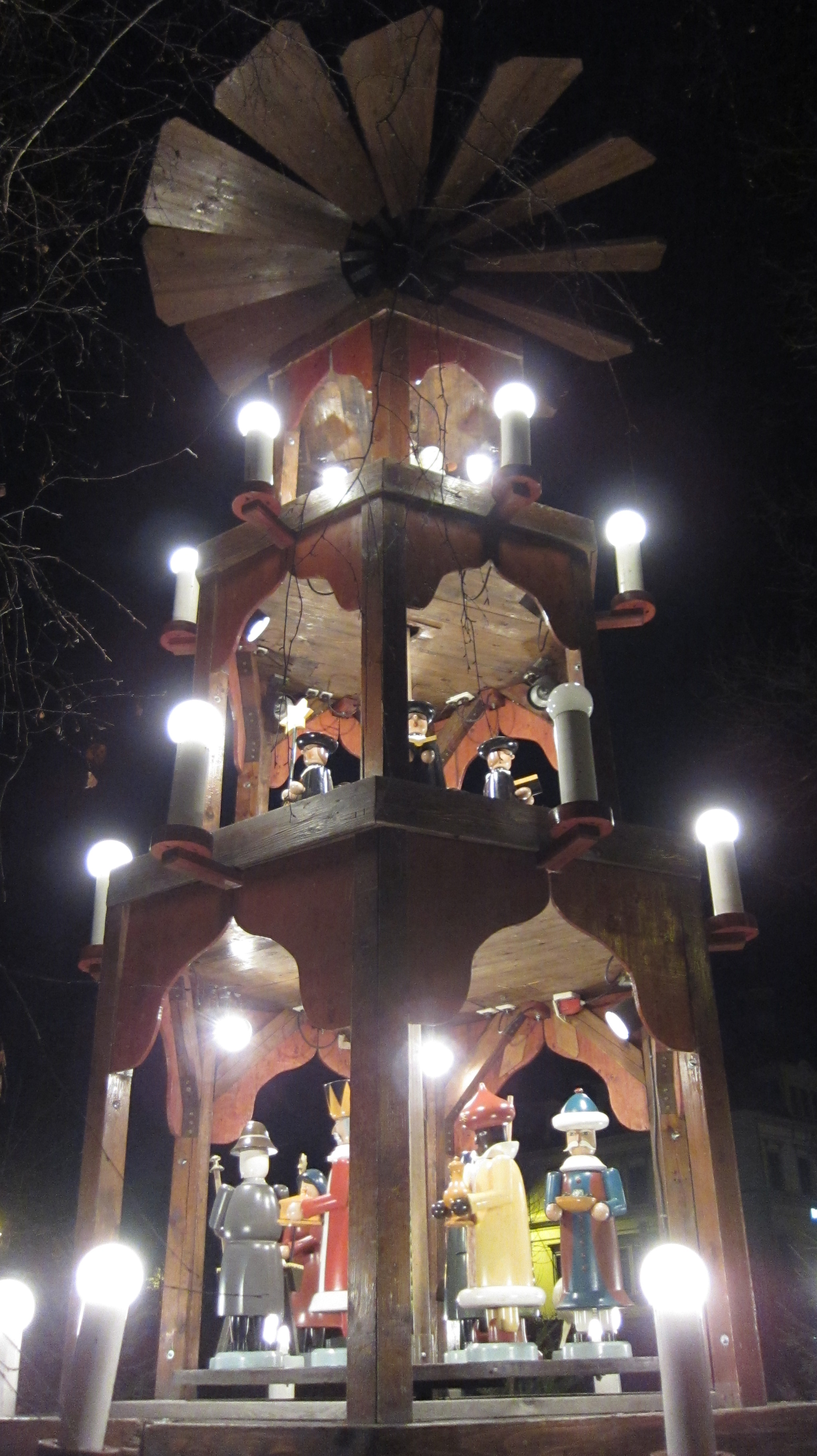 Detail der Weihnachtspyramide am Wasaplatz Dresden